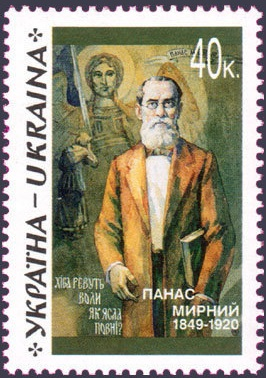 Поштова марка України "Панас Мирний" 1999